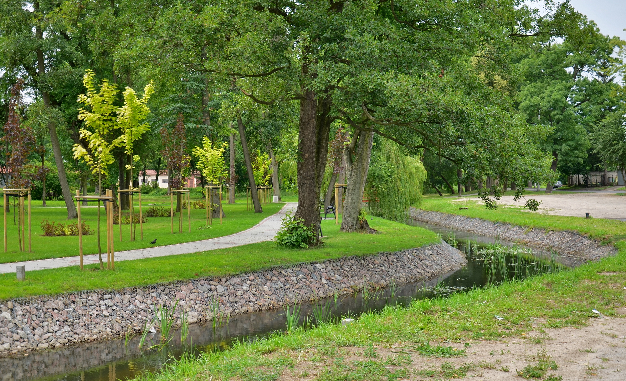 Rzeka Rypienica